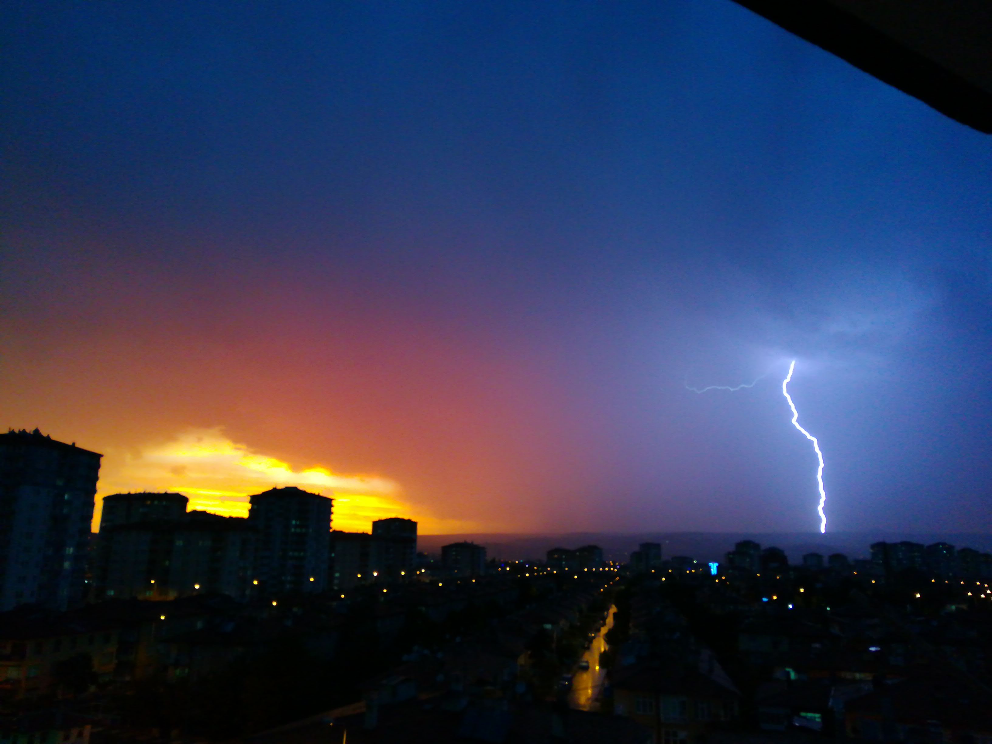 Anlık yakalanmış bir şimşek fotoğrafı.